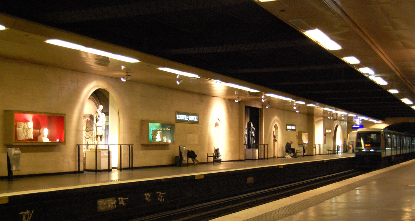 Station Louvre Rivoli du Métro de Paris(ligne 1), Paris, France. La station qui dessert le musée du Louvre est décorée avec des reproductions d'oeuvres figurant dans le musée.